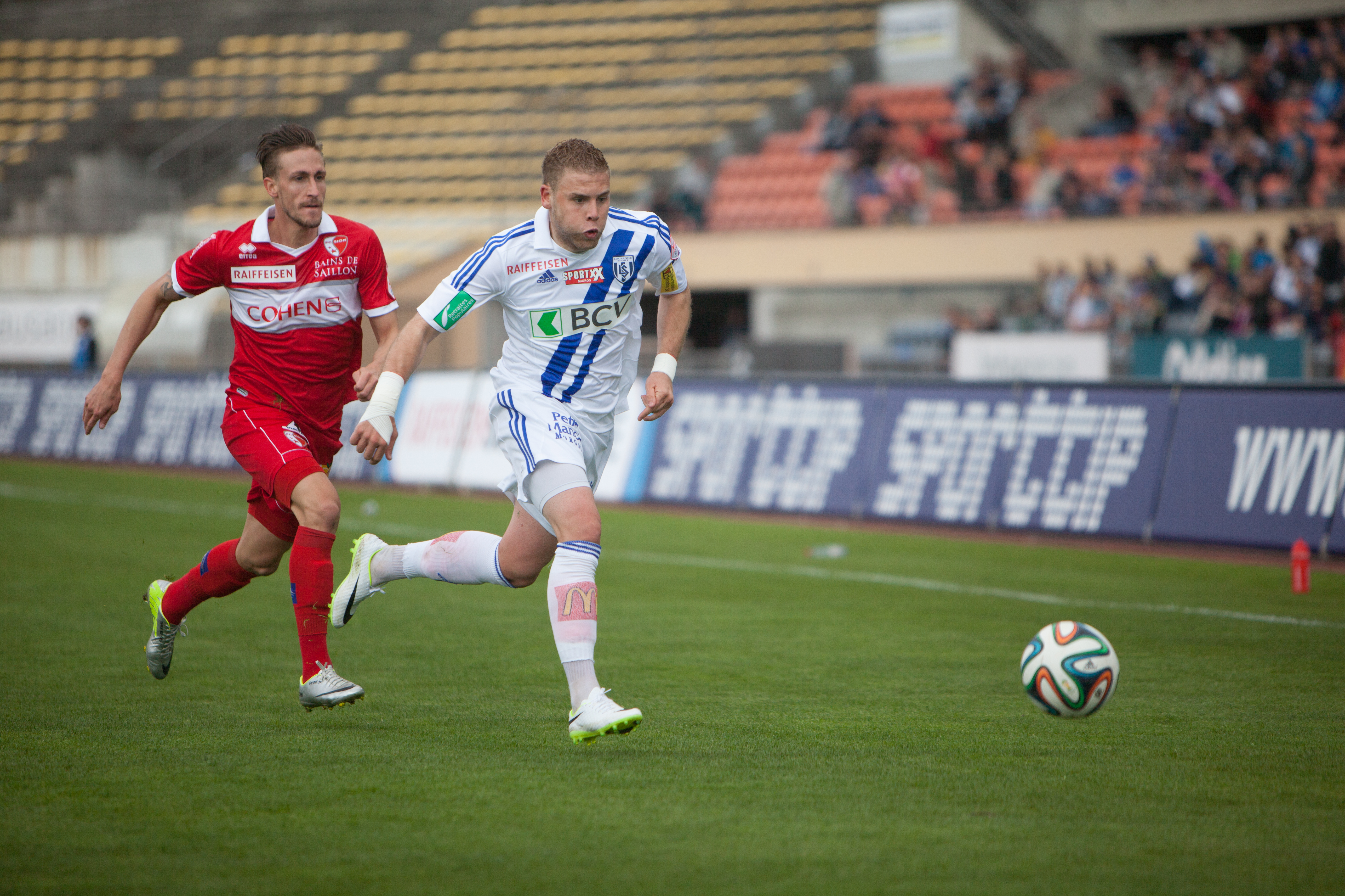 Lausanne Sport vs FC Sion - Avril 2014 - Vincent Rüfli & Yoric Ravet